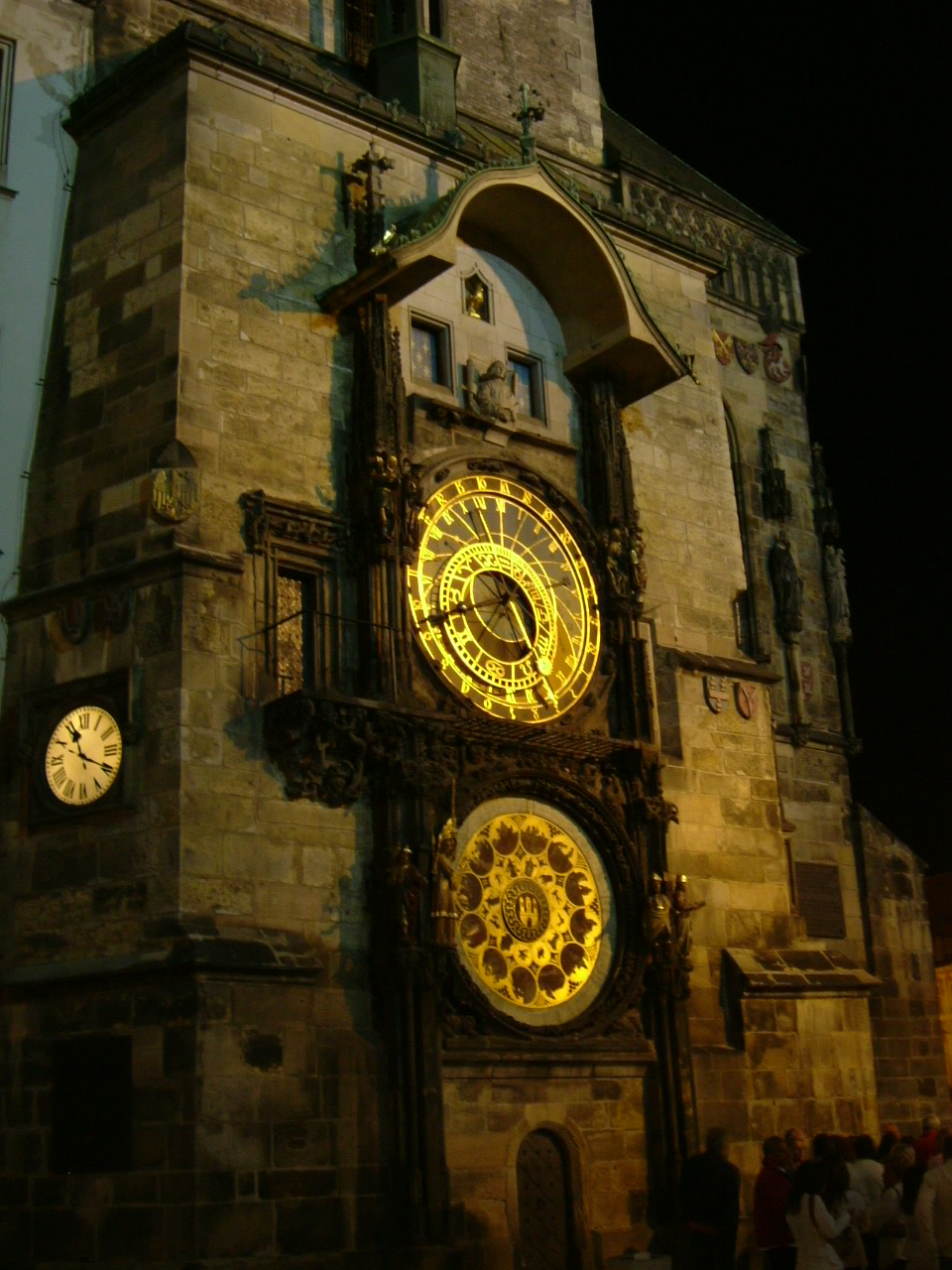 Die astronomische Uhr am Altstädter Rathaus bei Nacht